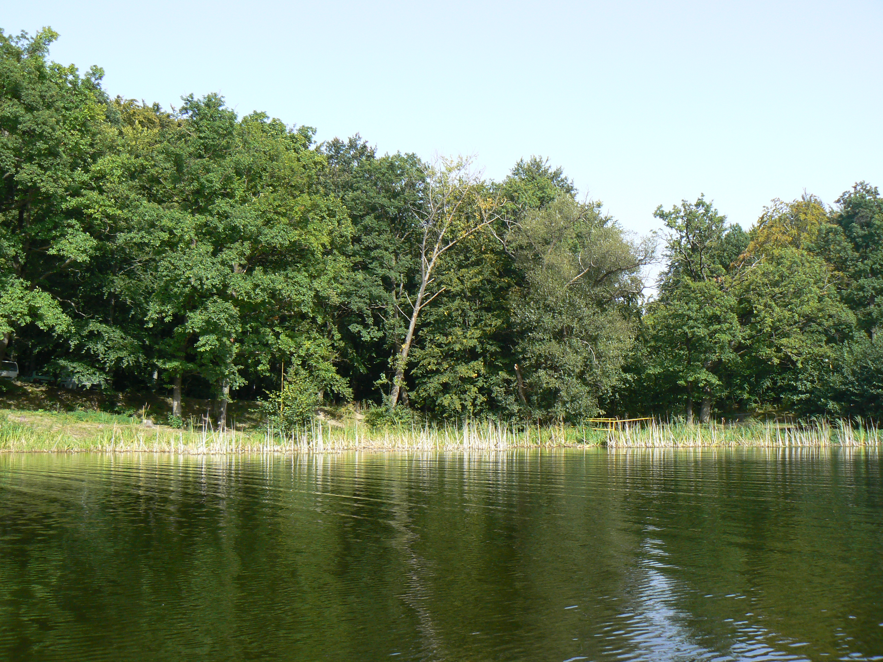 Jazero Izra